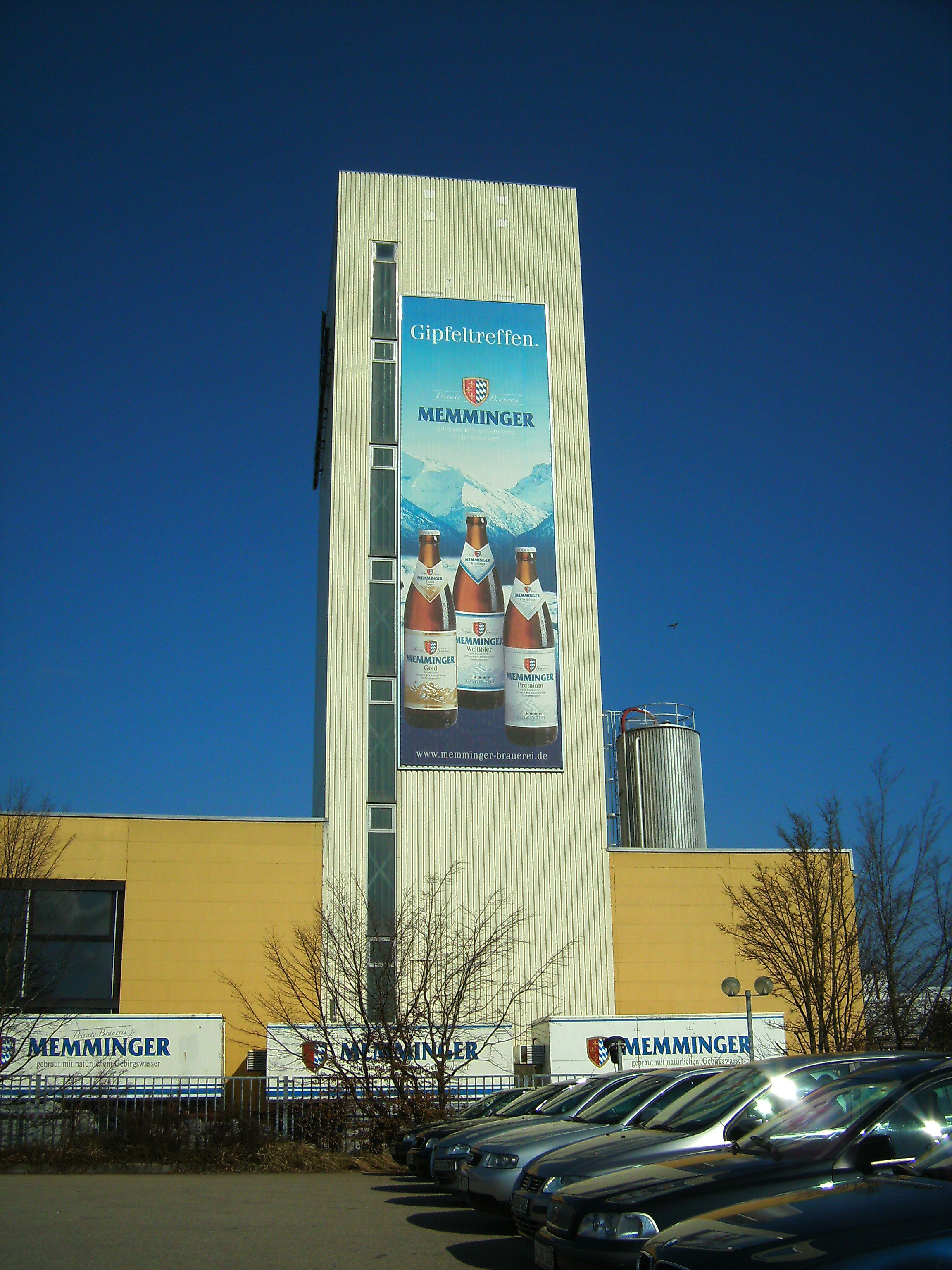 Memminger Brauerei, Industriegebiet Memmingen